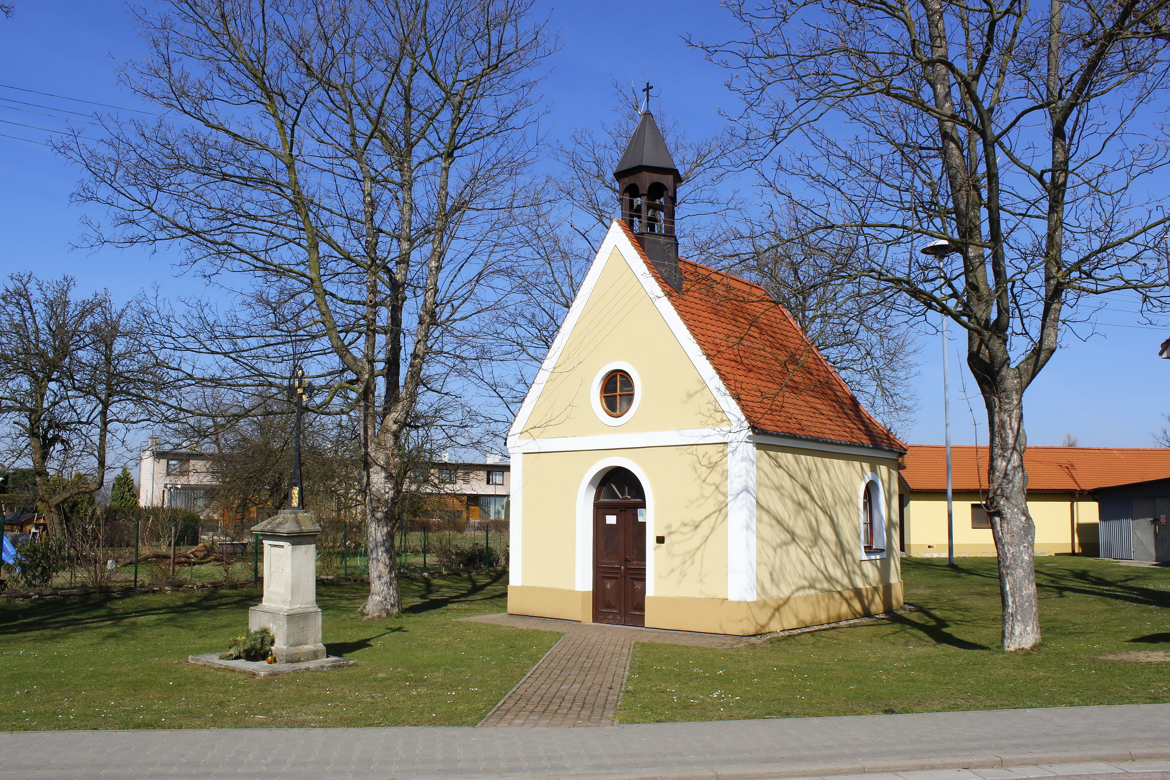 Ráby, křížek a kaple sv. Jana Nepomuckého.